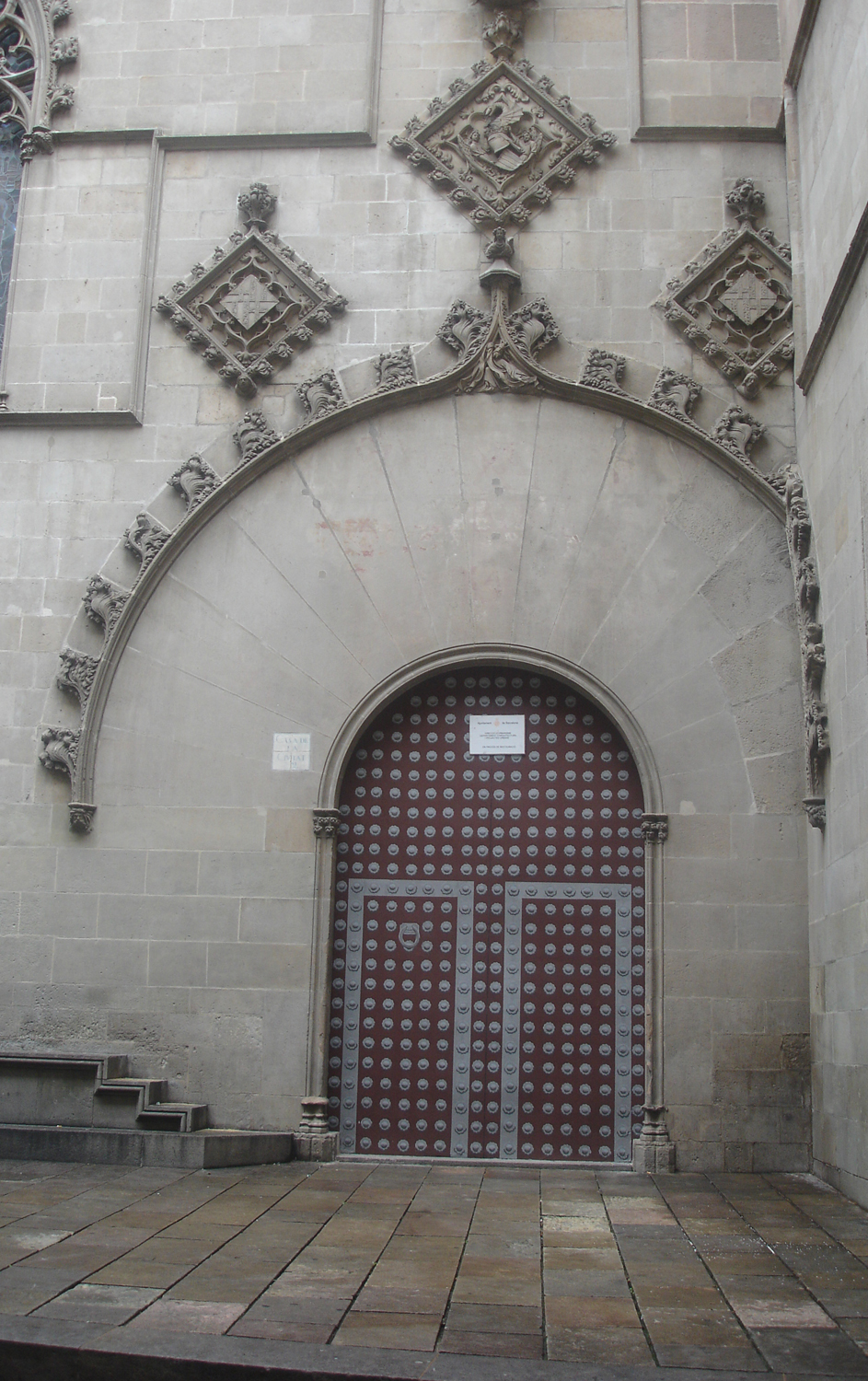 Façana antiga de l'ajuntament de Barcelona (Catalunya, Espanya) - Porta dreta